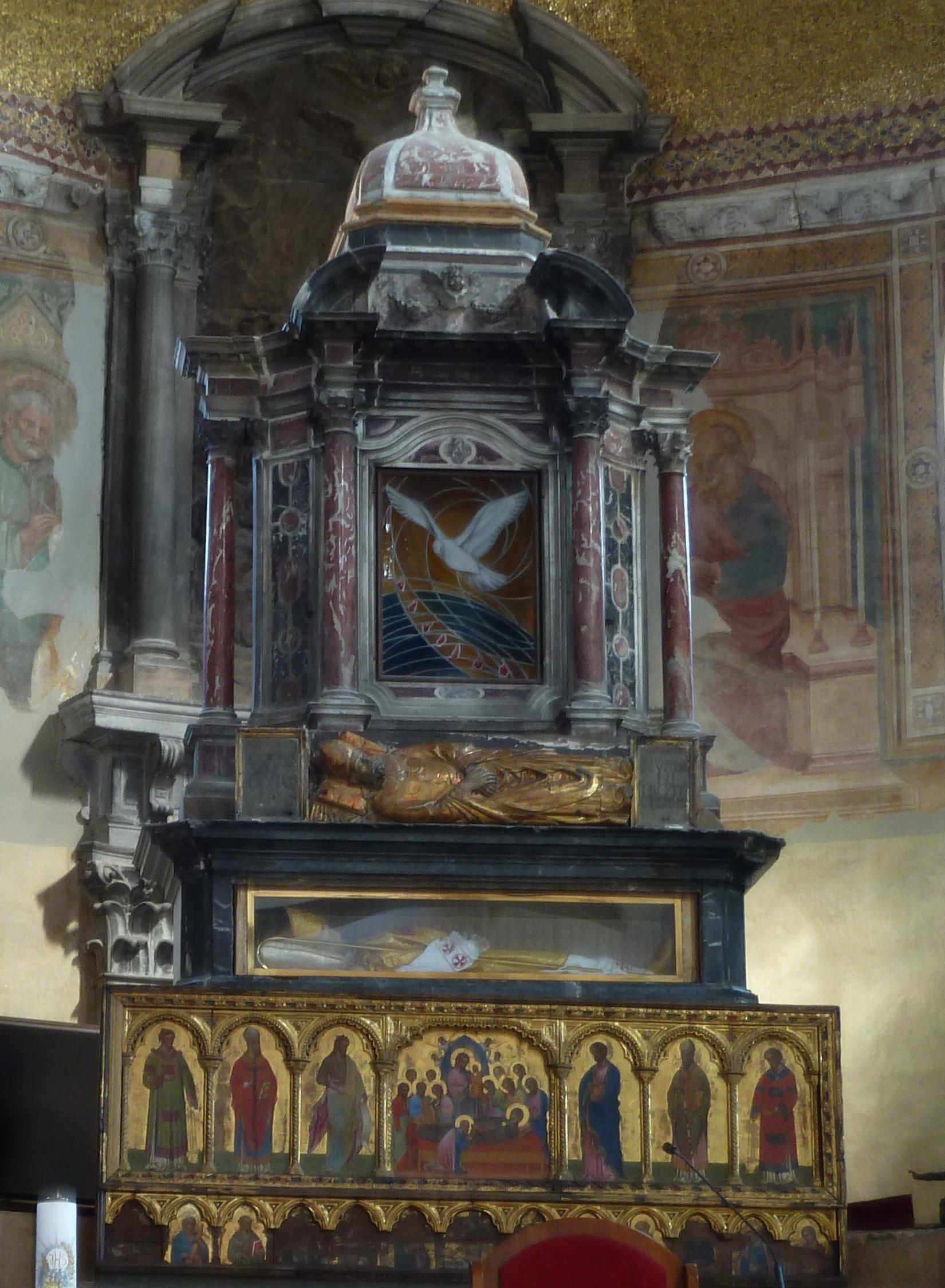 Murano, SS. Maria e Donato, Altar mit Liegeskulptur und Reliquienschrein des hl. Donatus von Evorea